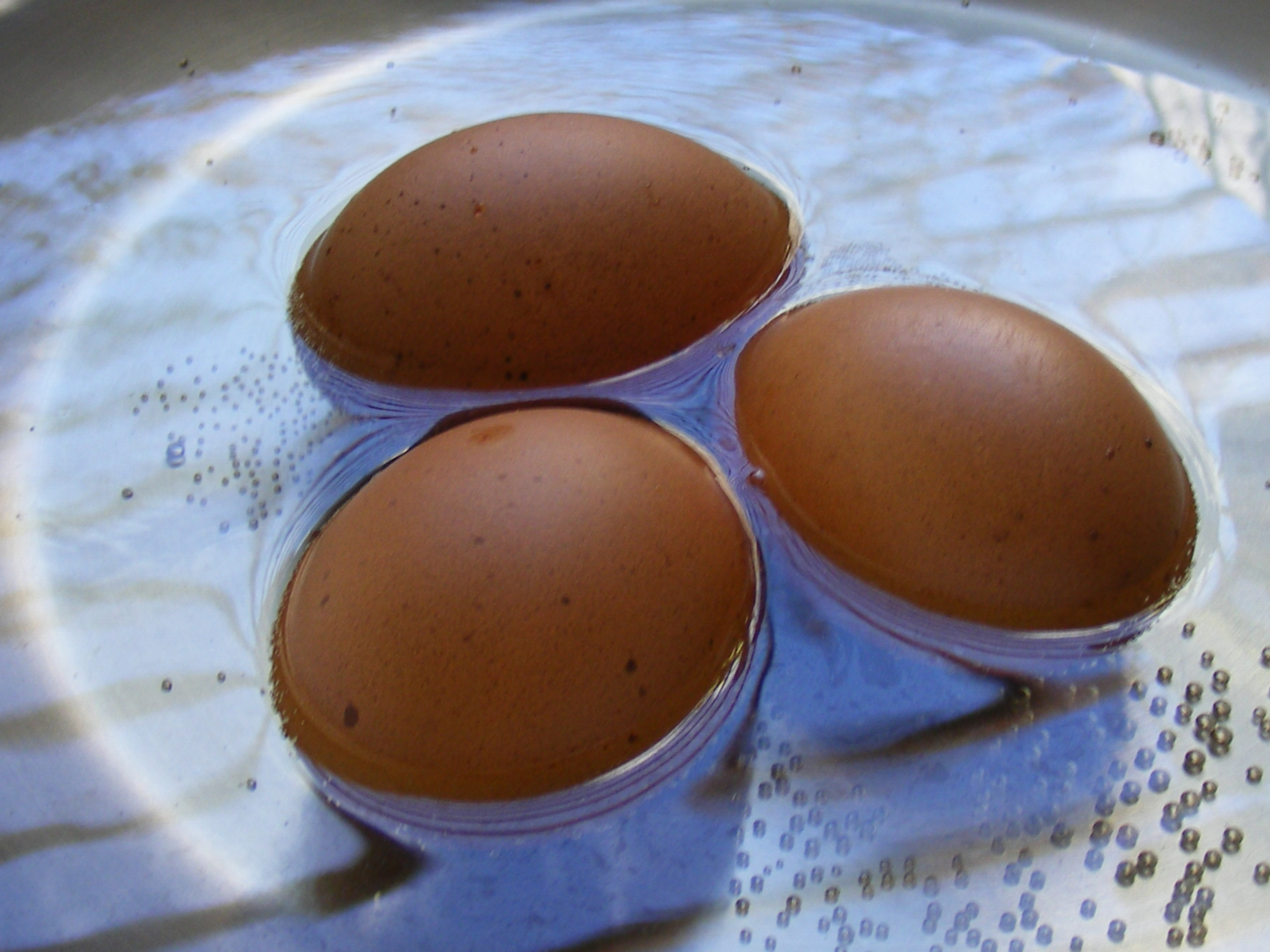 Huevos de Gallina